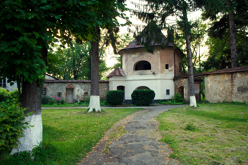 Одна з башт палацу Телекі